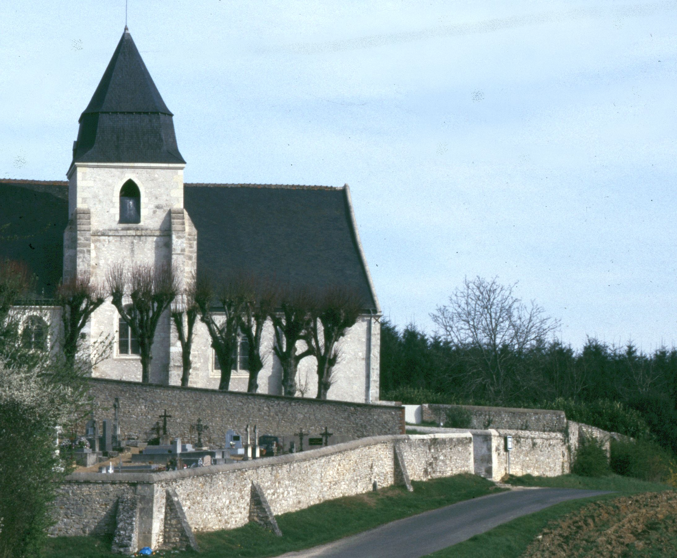 St. Secondin